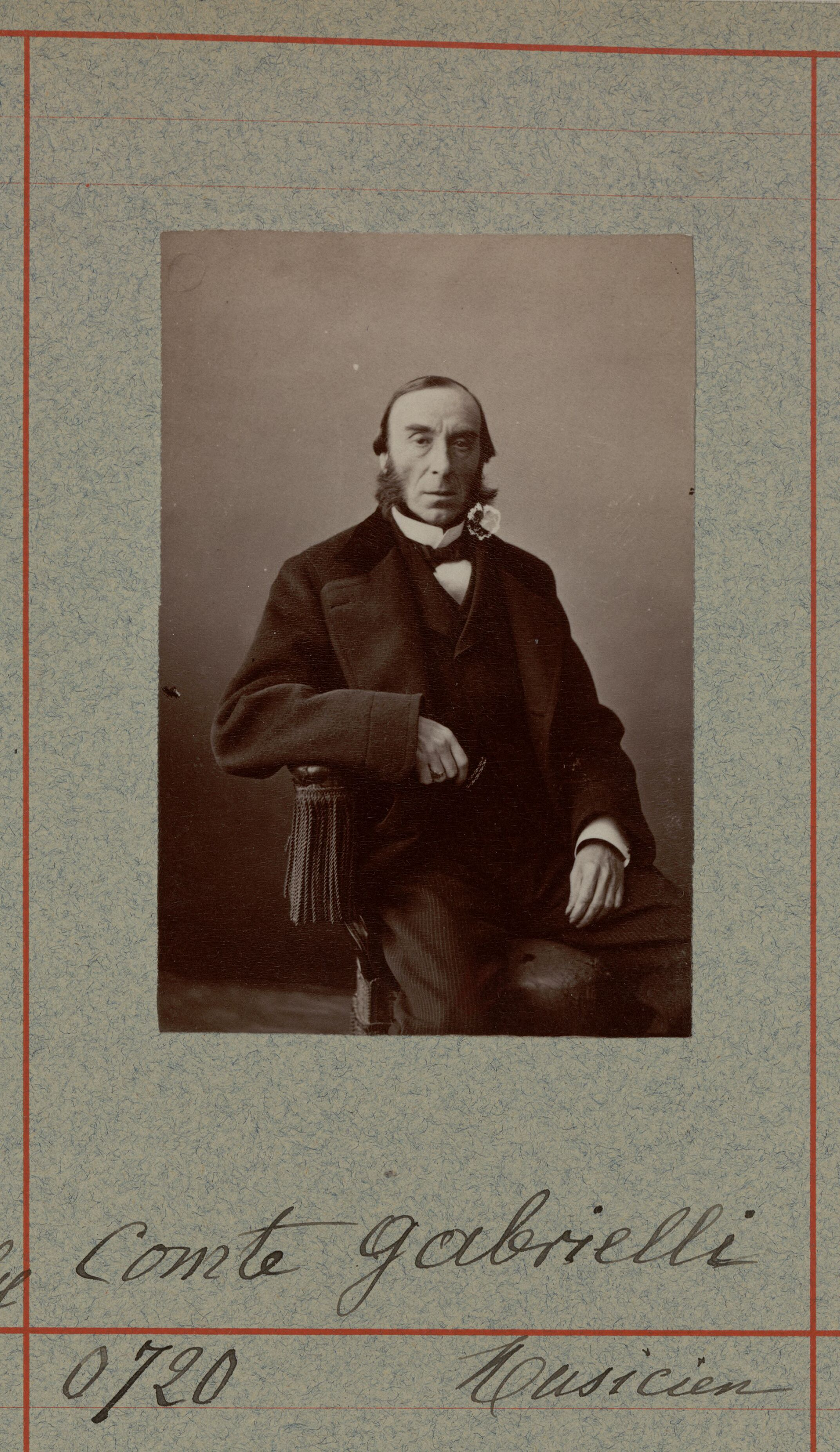 Le comte Nicolò Gabrielli, musicien, portrait par Nadar